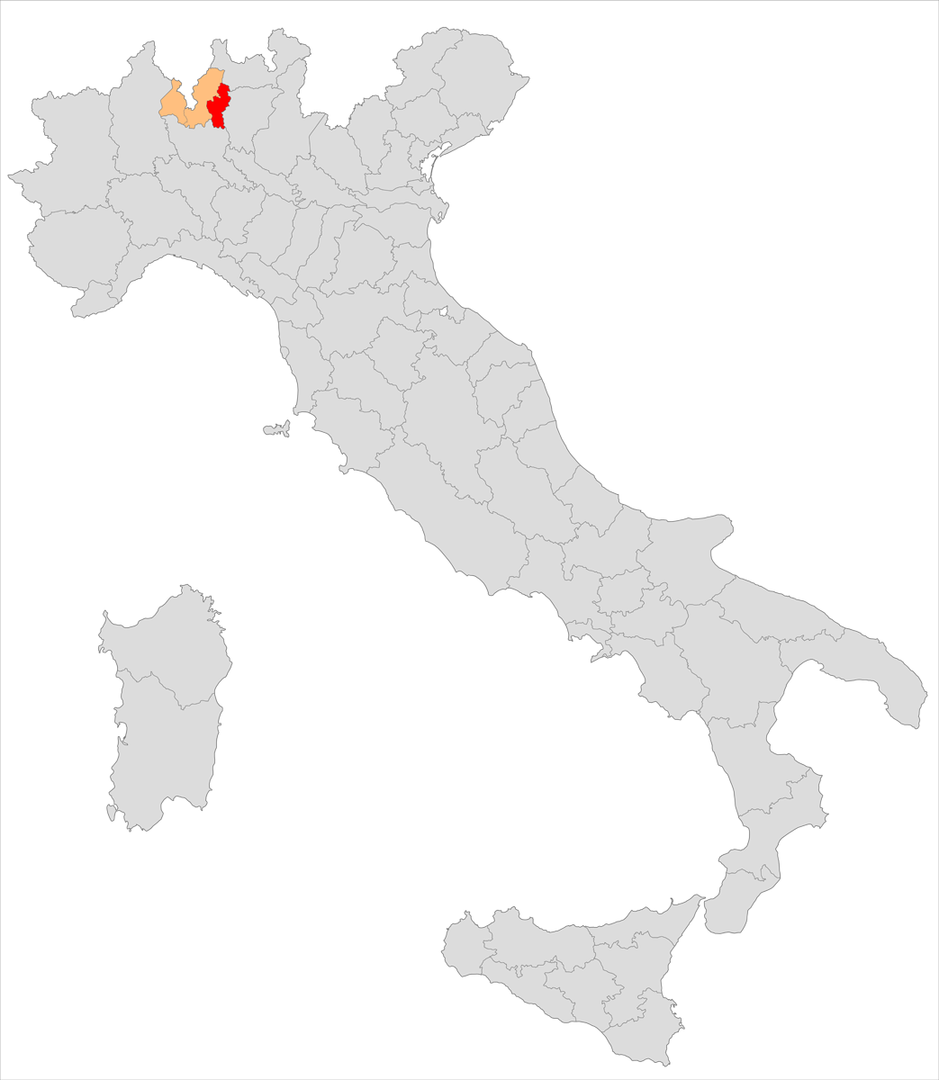 Il circondario di Lecco nella provincia di Como (1859-1927)